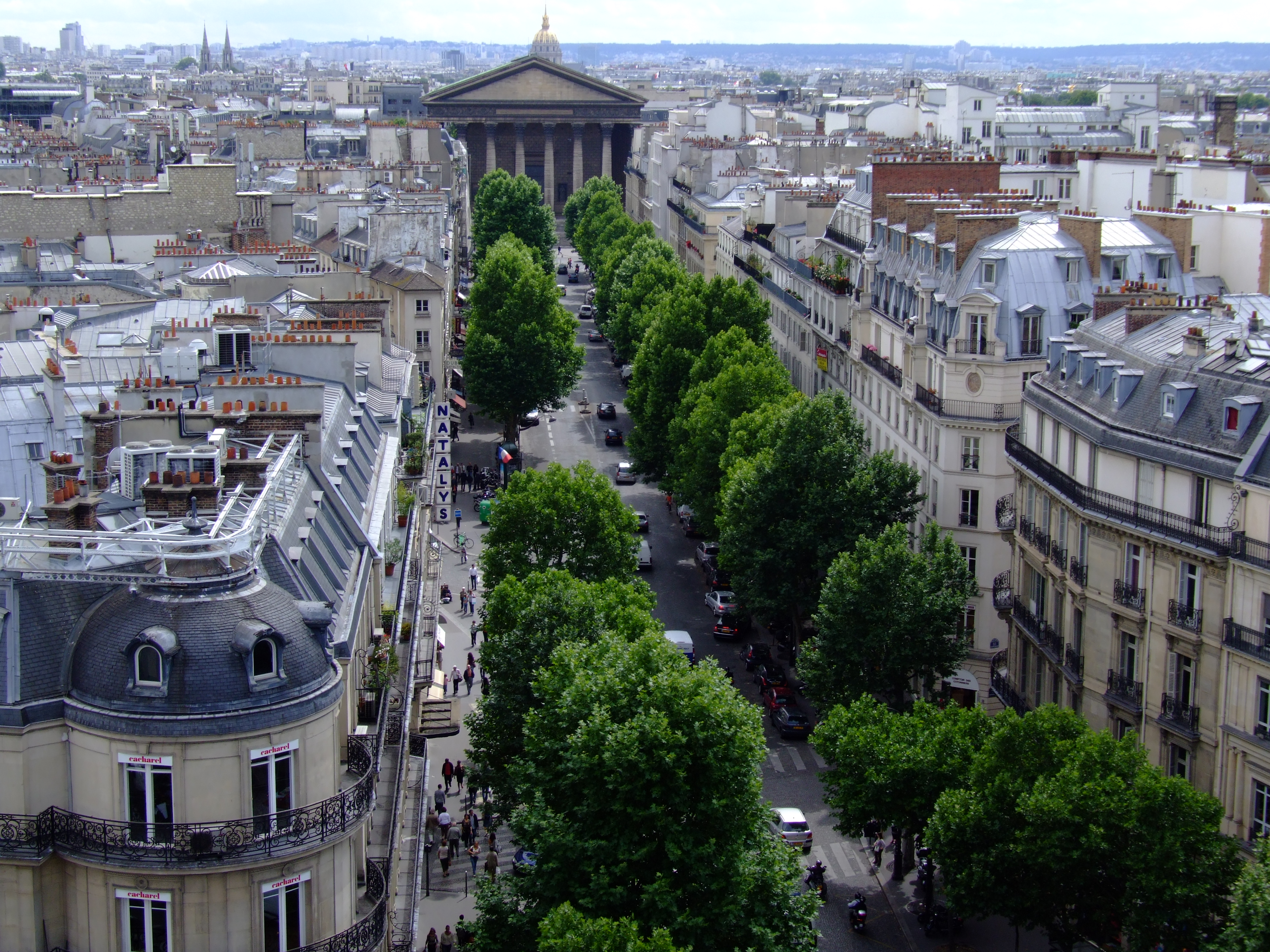 Vue de la Rue Tronchet en direction de l'église de la Madeleine, Paris, France.